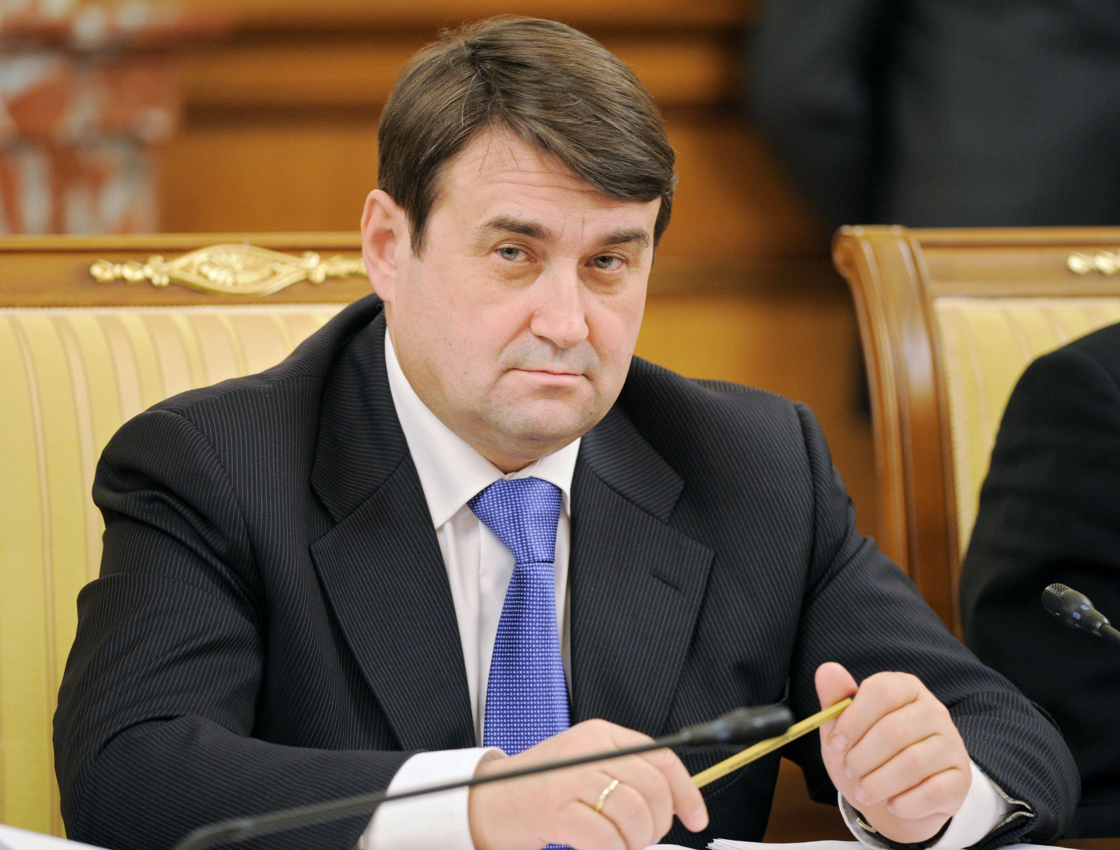 Министр транспорта Российской Федерации И. Е. Левитин на заседании Правительства Российской Федерации